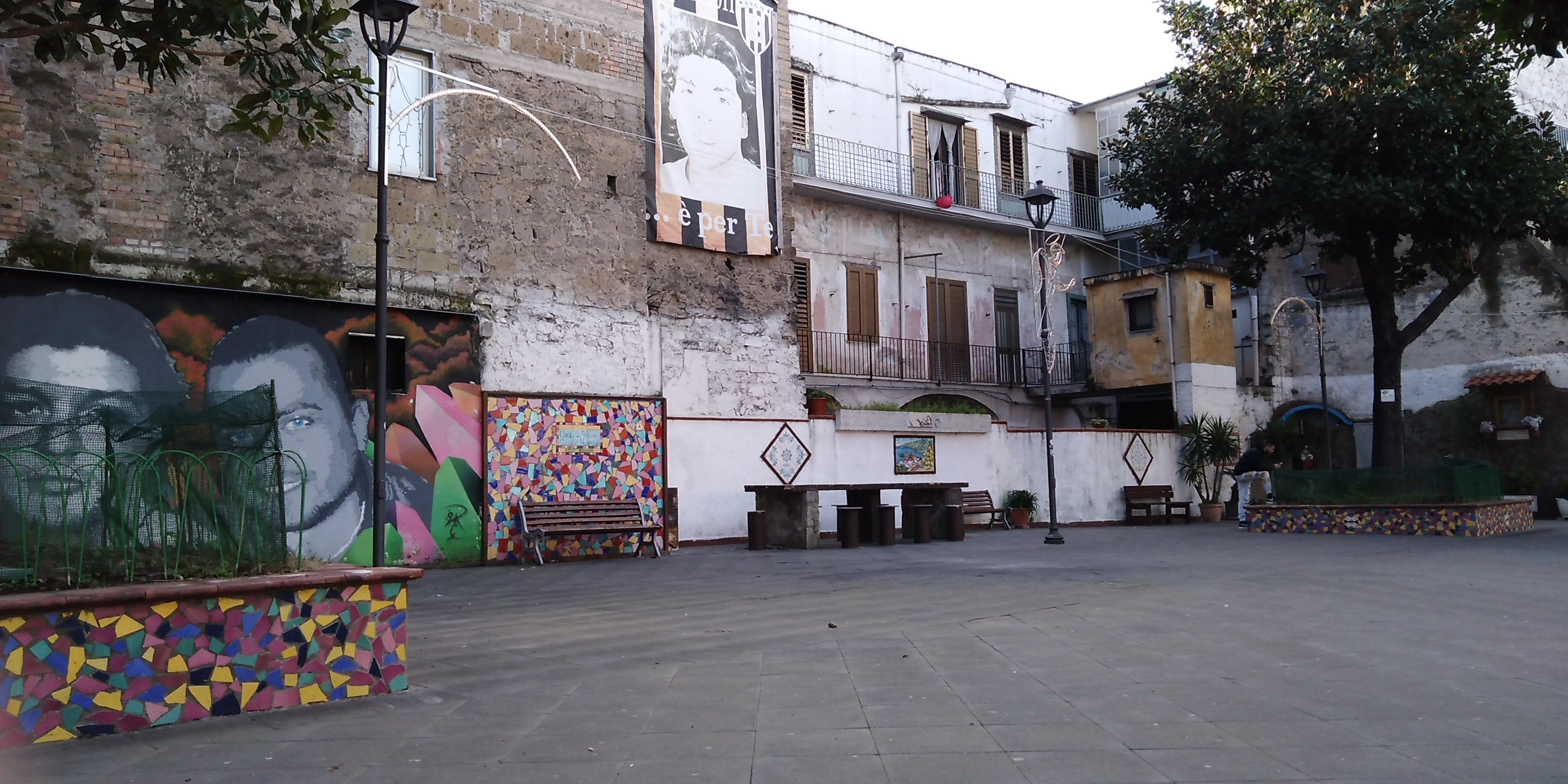 La Piazzeta del Casale Nuovo, Nocera Inferiore.